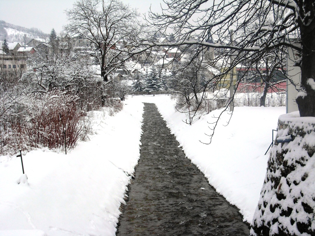 Crna rijeka u naselju Rika u Mrkonjić Gradu